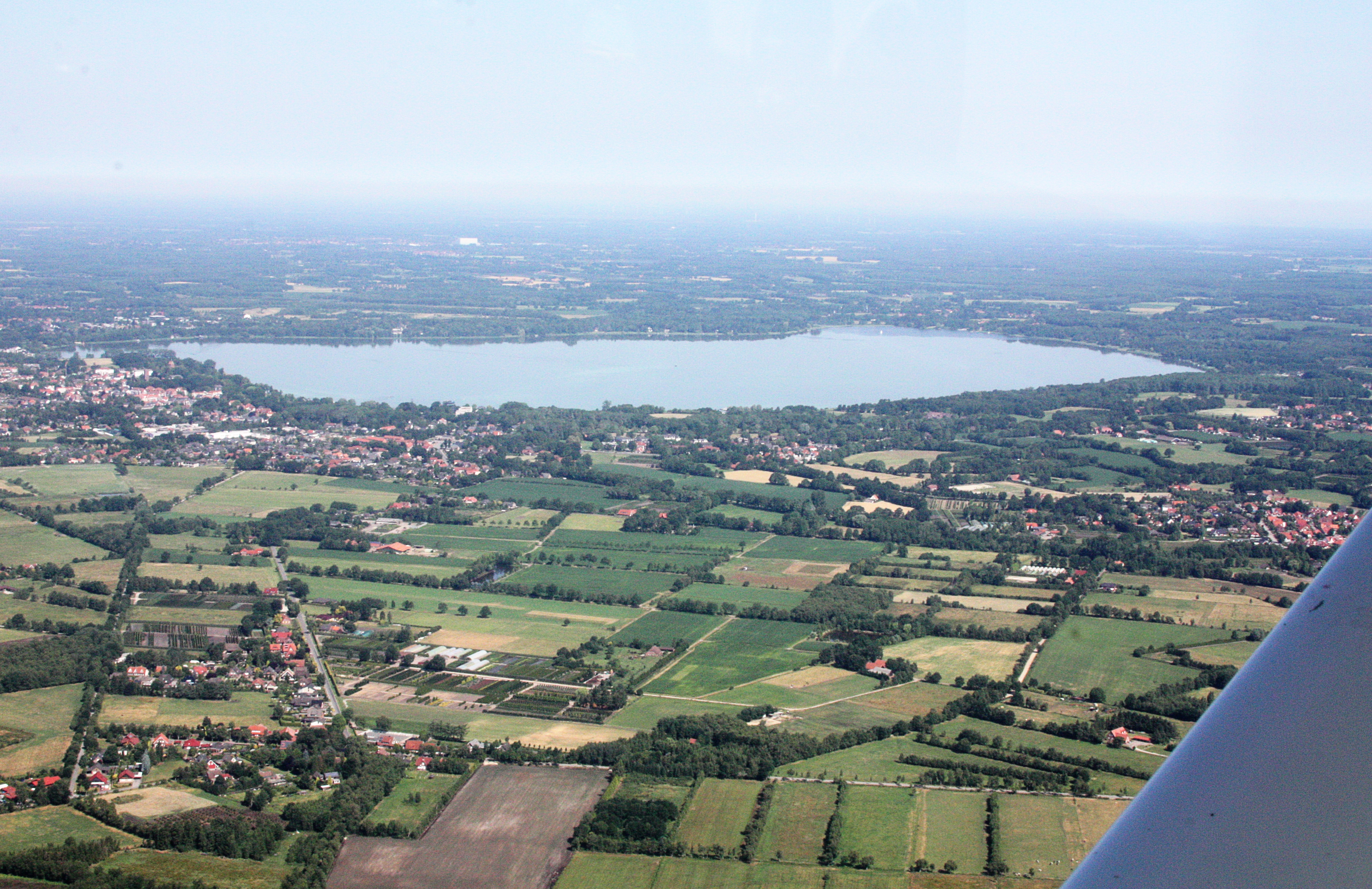 Flug von Oldenburg (Oldenburg) nach Bad Zwischenahn und zur Landesgartenschau ; Flughöhe 1500 ft; Juli 2010; Originalfoto bearbeitet: Tonwertkorrektur und Bild geschärft mit Hochpassfilter